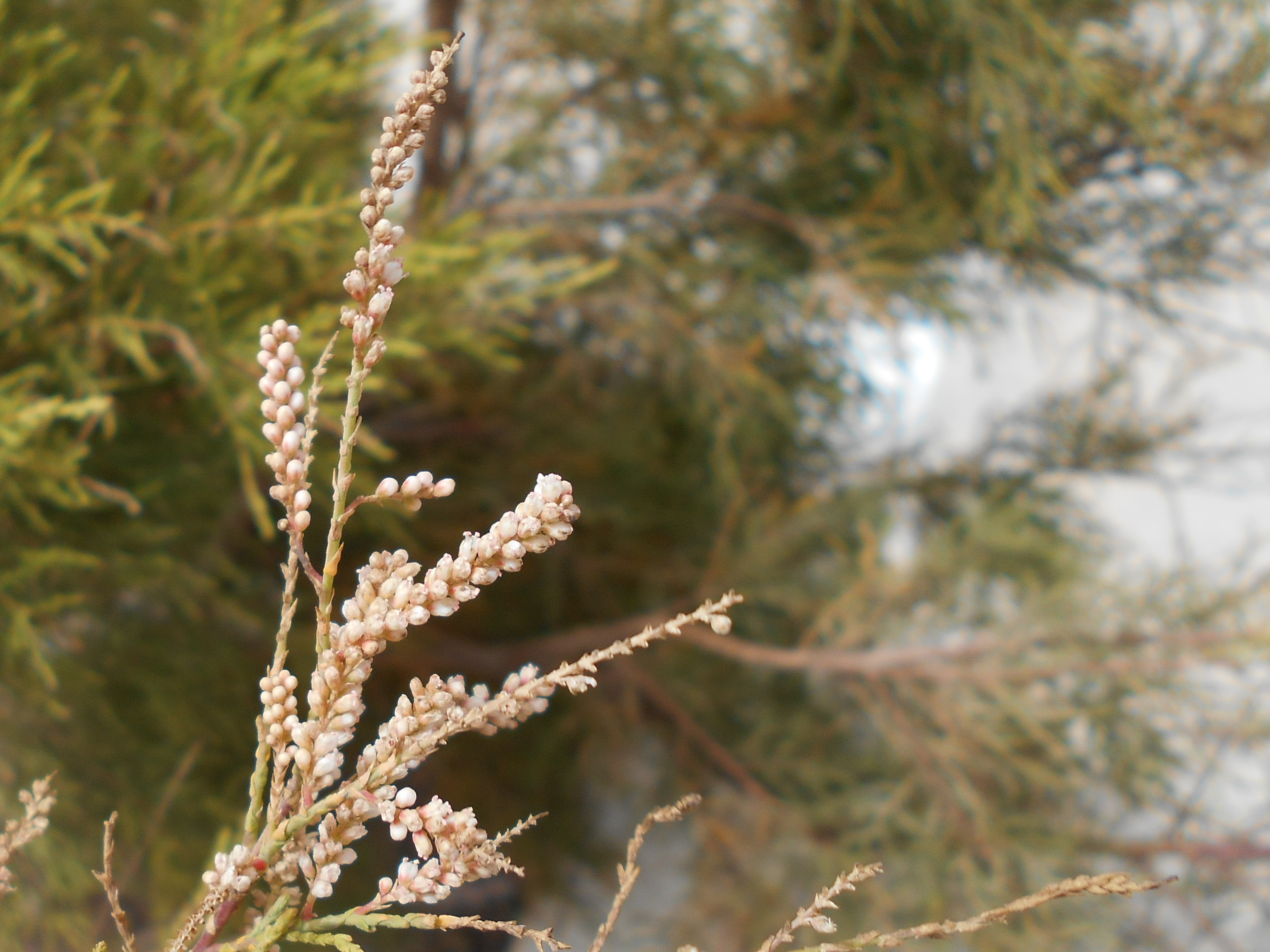 fiori di Tamarix senegalensis